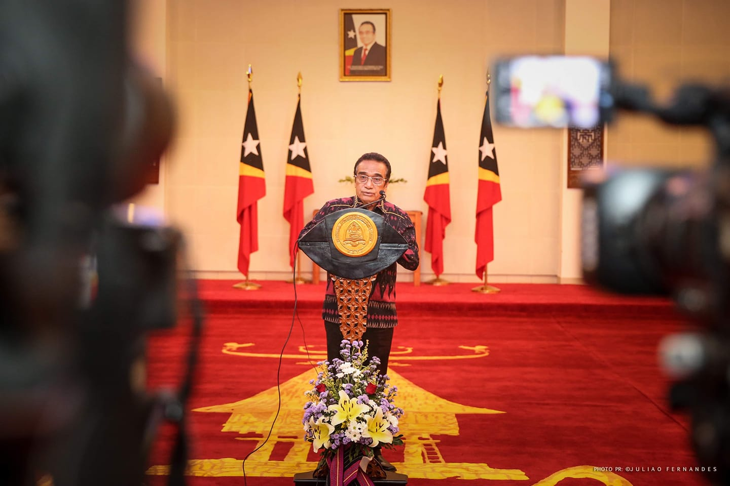 Präsident Francisco Guterres gibt eine Pressekonferenz zu Corona